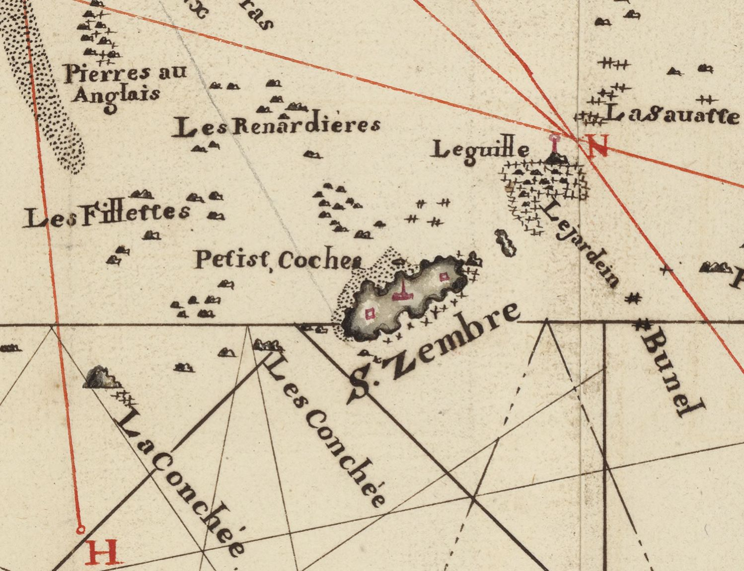 Extrait d'une carte au [1 : 37 500] de Saint Malo et de ses environs, montrant l'île de Cézembre (orthographiée S[aint] Zembre). On peut voir sur l'île le couvent des Recollets, détruit par les Anglais deux ans plus tard en 1693.